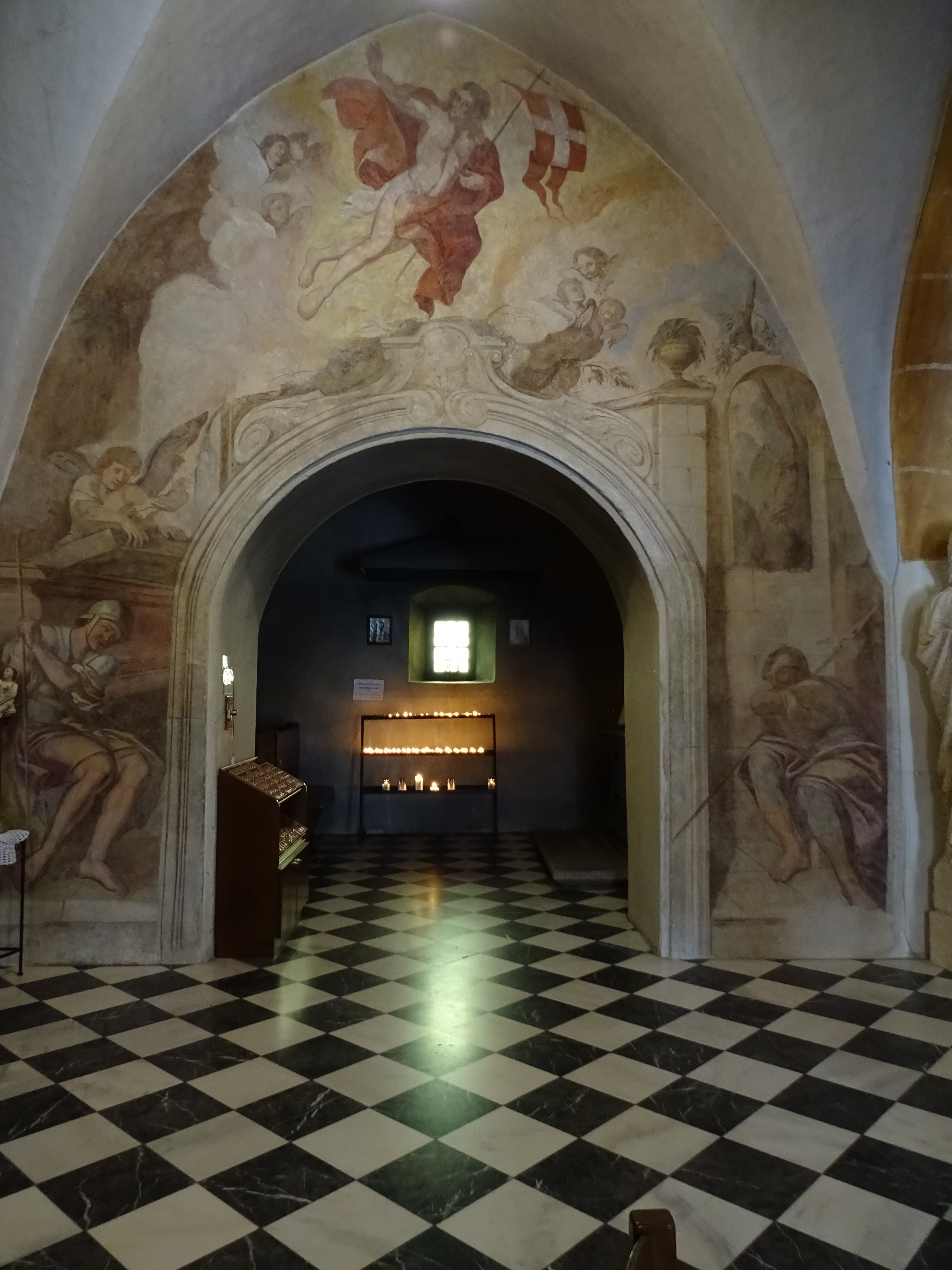 Die Marienkapelle in der Wallfahrtskirche Maria Straßengel. An der Wand befindet sich eine Darstellung des auferstandenen Jesus und er Grabwächter aus dem Anfang des 18. Jahrhundert.